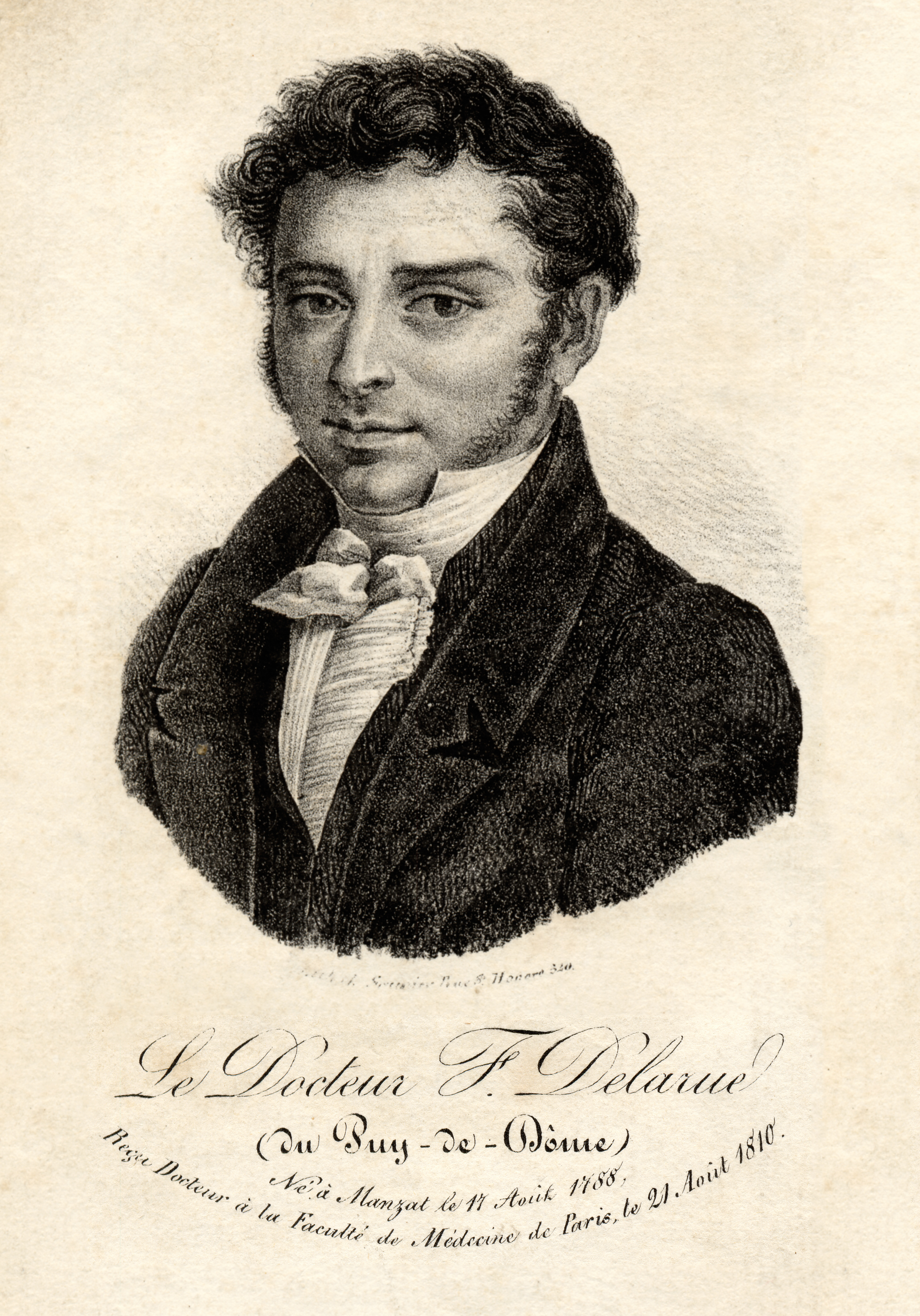 Gravure représentant François Delarue.